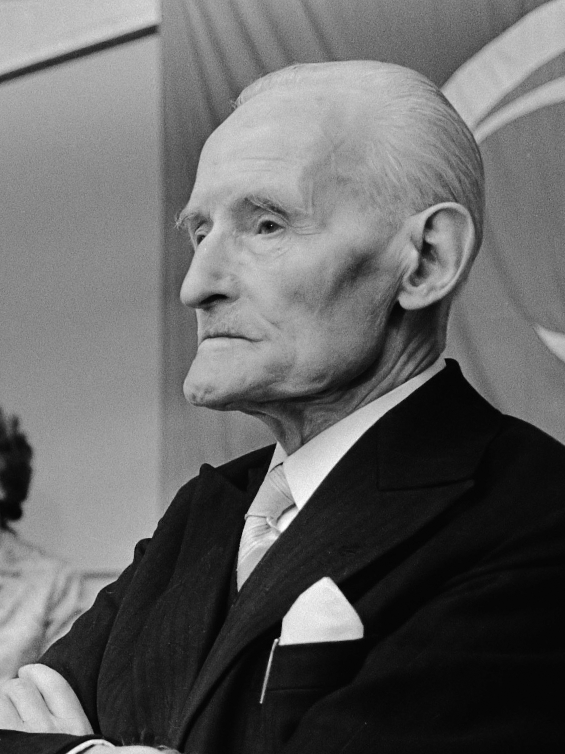 Dr. Moerman op een manifestatie in de Houtrusthallen in Den Haag. Dr. Moerman zittend op het toneel; rechts van hem genezen patienten 26 mei 1979